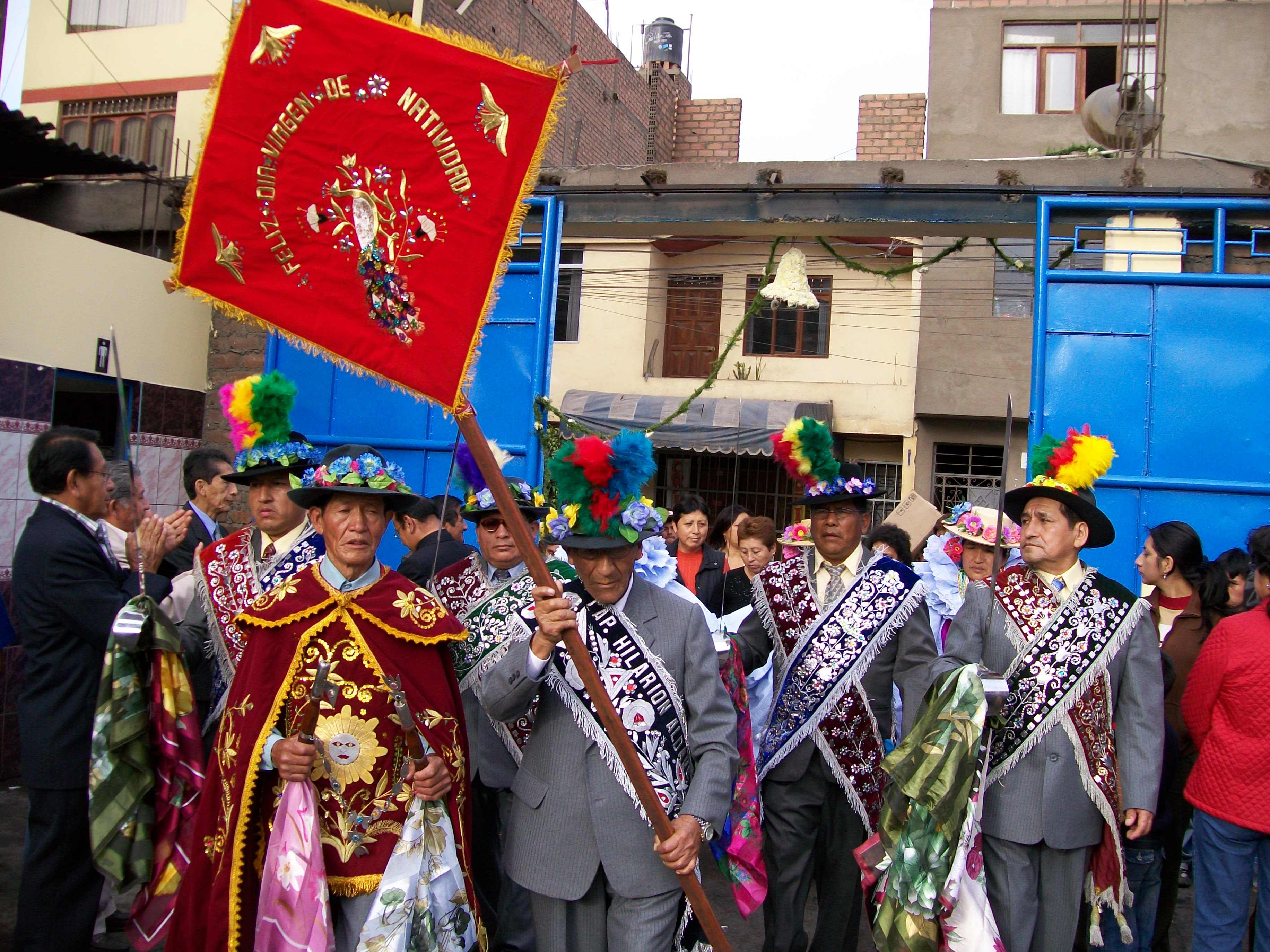 Entrada triunfal costumbrista del capitán.